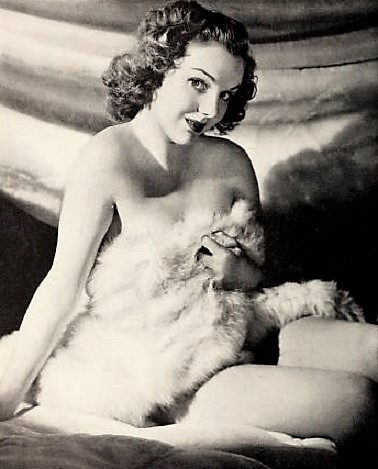 Lynn Merrick